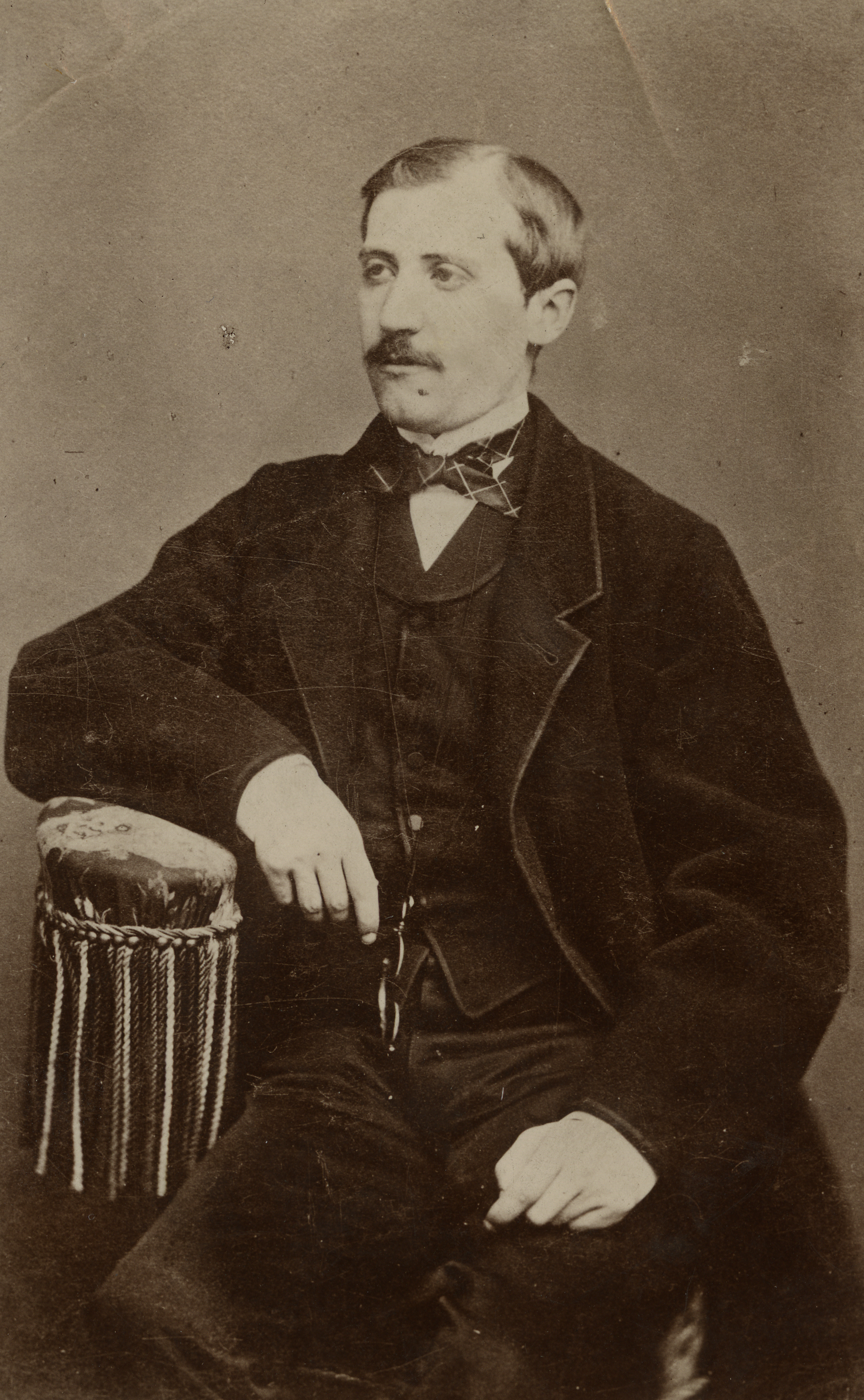 Portrait photographique d'Ernest Roschach (1837-1909), archiviste de la mairie de Toulouse de 1862 à 1898, historien, conservateur du musée des Augustins puis du musée Saint-Raymond. Ce portrait est issu du recadrage d'un tirage conservé aux Archives de la mairie de Toulouse. Il est daté de 1875 selon Guy Desazars de Montgailhard et selon Louis Soulé, auteurs chacun d'une biographie d'Ernest Roschach. Photographie N&B, 13 x 15 cm. Domaine public. L'auteur est Eugène Delon, photographe à Toulouse de 1866 à 1894, né le 13 février 1823, décédé le 22 septembre 1894.